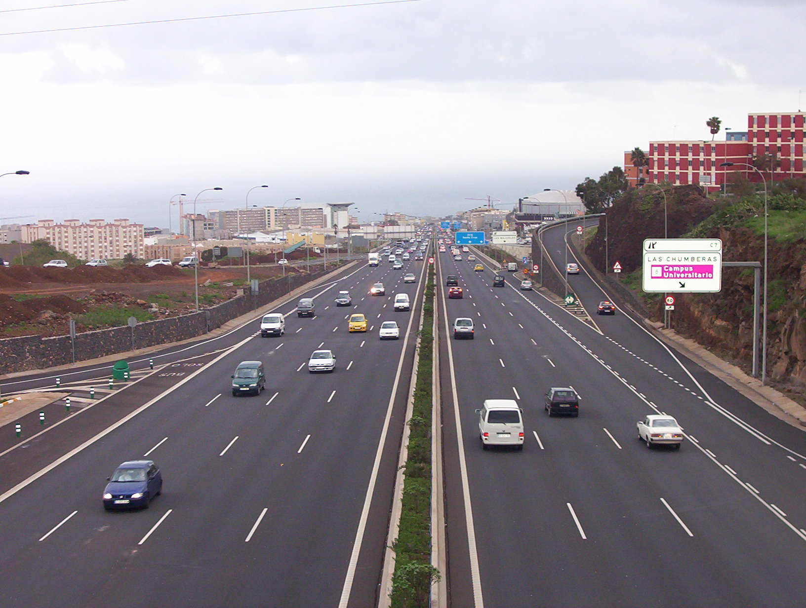 Autopista TF-5 a la altura de San Cristóbal de La Laguna (Tenerife, Canarias, España)